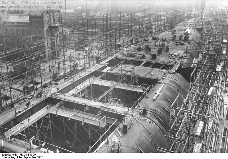 Flugzeugträger "A". Baustadium Deutsche Werke Kiel Aufgen. am 14.9.1937